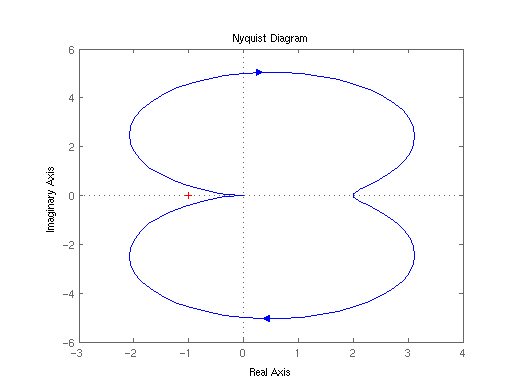 Nyquist Diagram (PT2, T = 1, K = 2, d = 0.2)